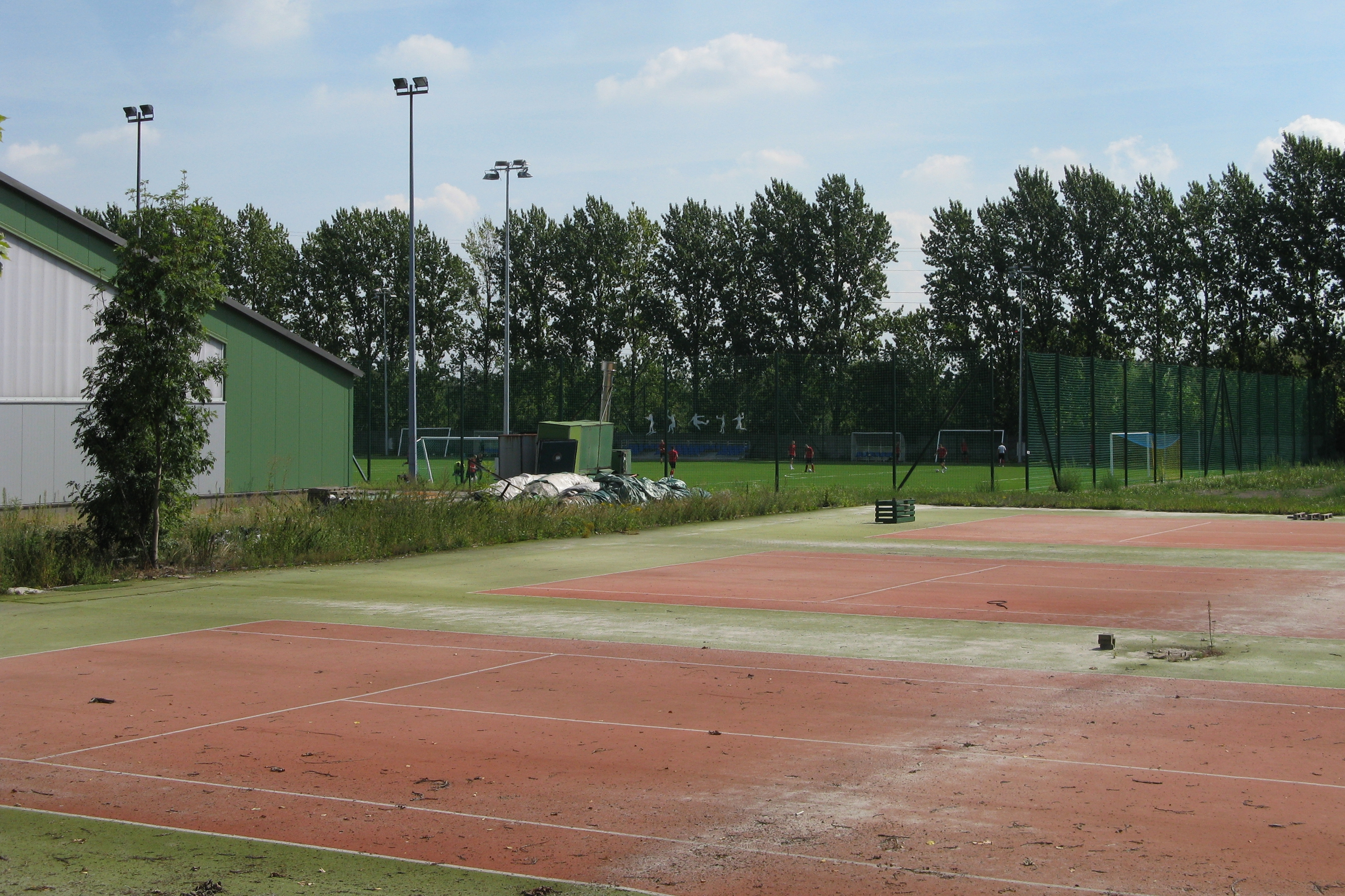 korty tenisowe i boisko do piłki nożnej przy ul. Harcerskiej w Chorzowie, obecnie Sokół Chorzów, dawniej Azoty Chorzów